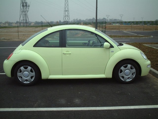 Auteur: Philippe BAILLY